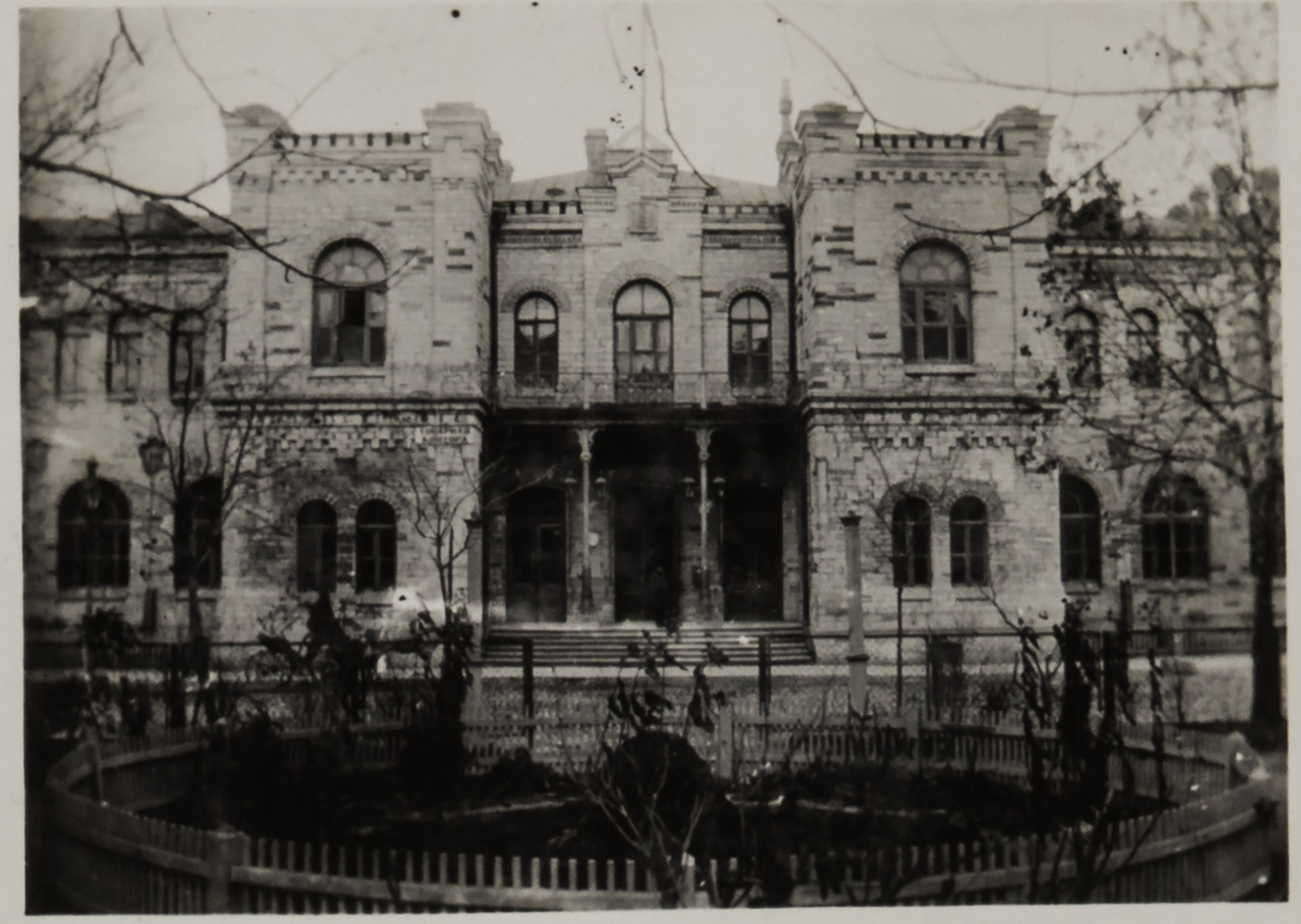 Balti jaama esine iluaiaga